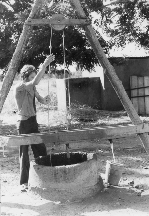 Zie voor een opname van het wateropvoer-mechanisme terwijl een Samo vrouw er water mee omhoogpompt inventarisnummer 20010209.